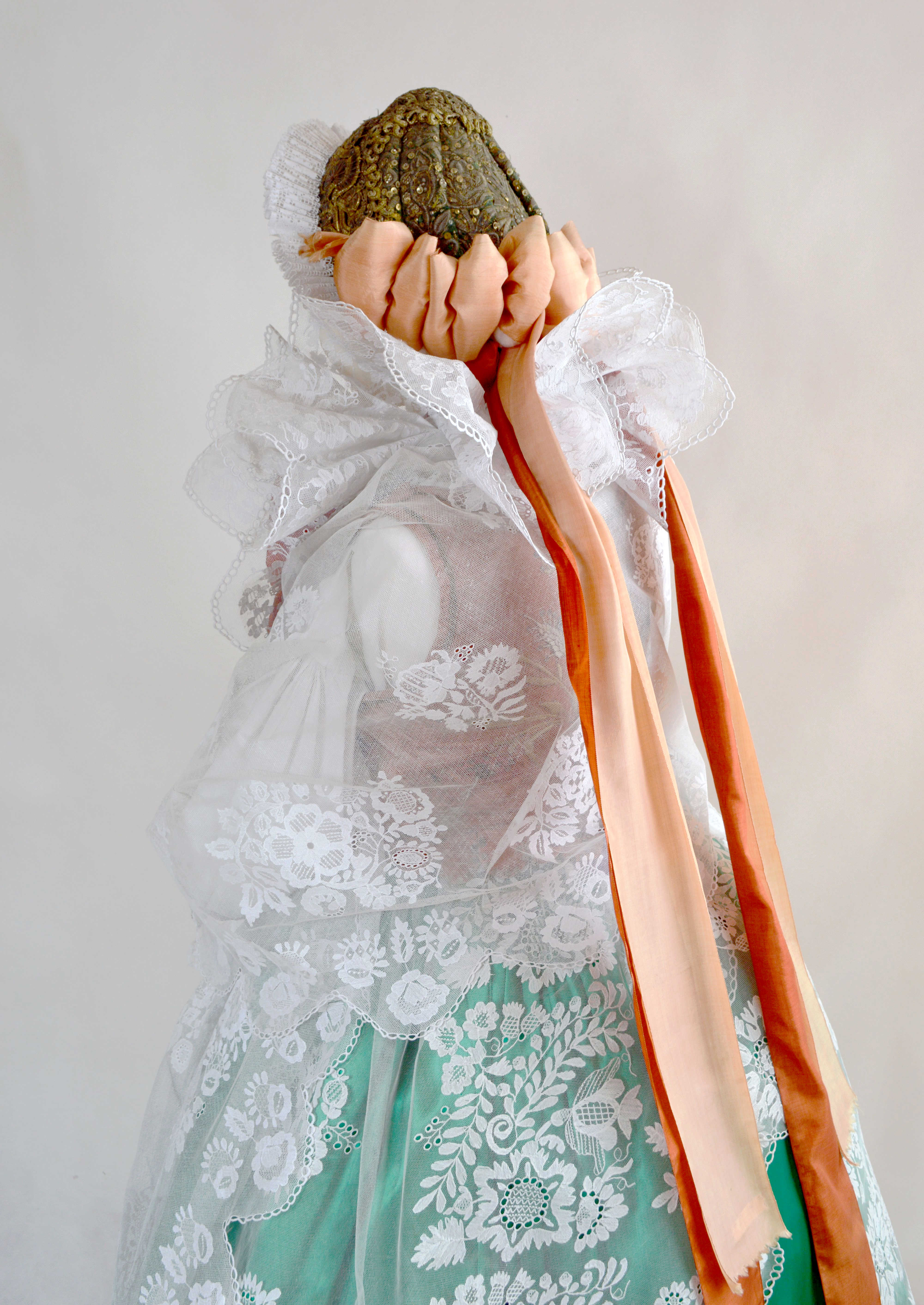 Żywiecki strój mieszczański, Muzeum Miejskie w Żywcu